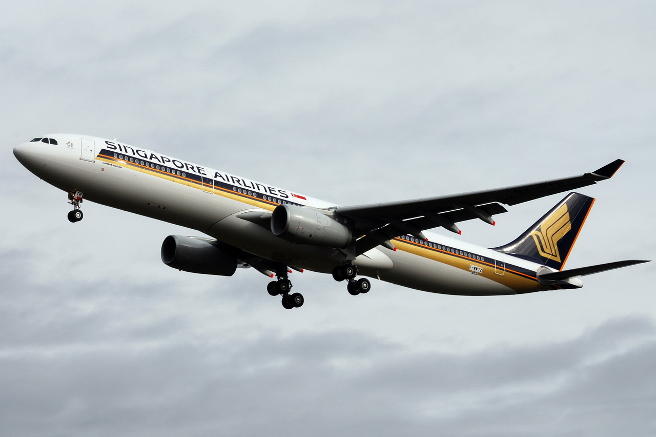 Photo prise à l'aéroport de Toulouse-Blagnac (LFBO) en France. Picture take at Toulouse-Blagnac Airport (LFBO) in France.